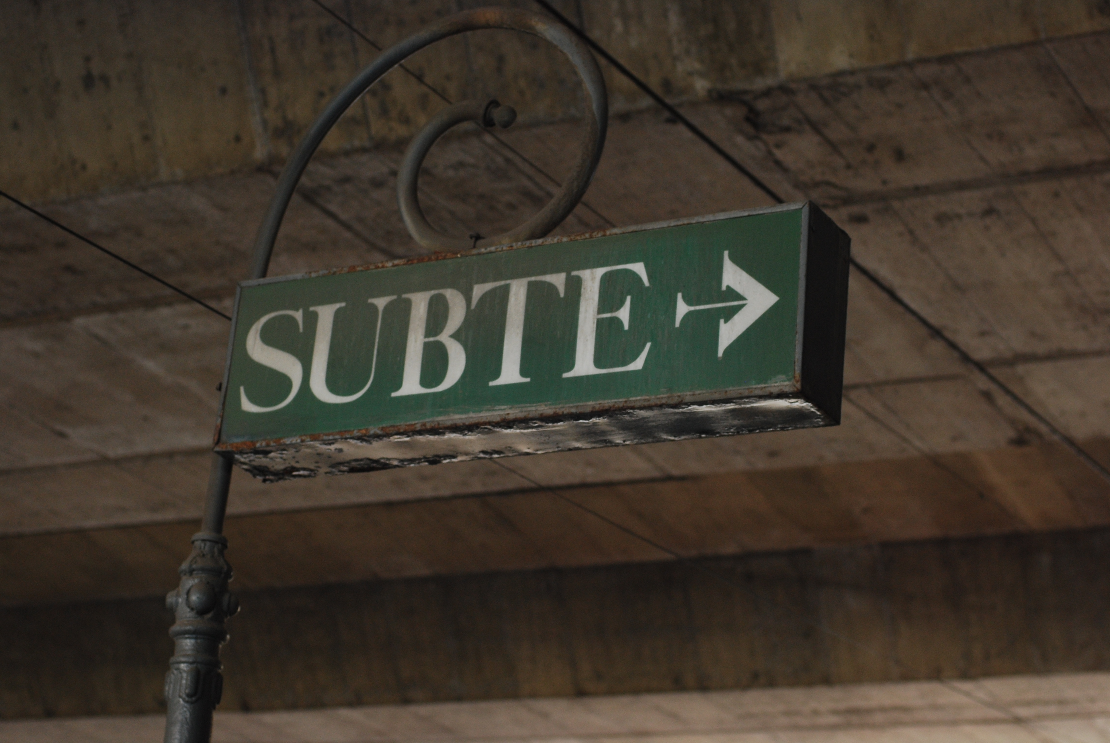 Cartel antiguo en la boca del subte, estación Varela de la línea E, Buenos Aires